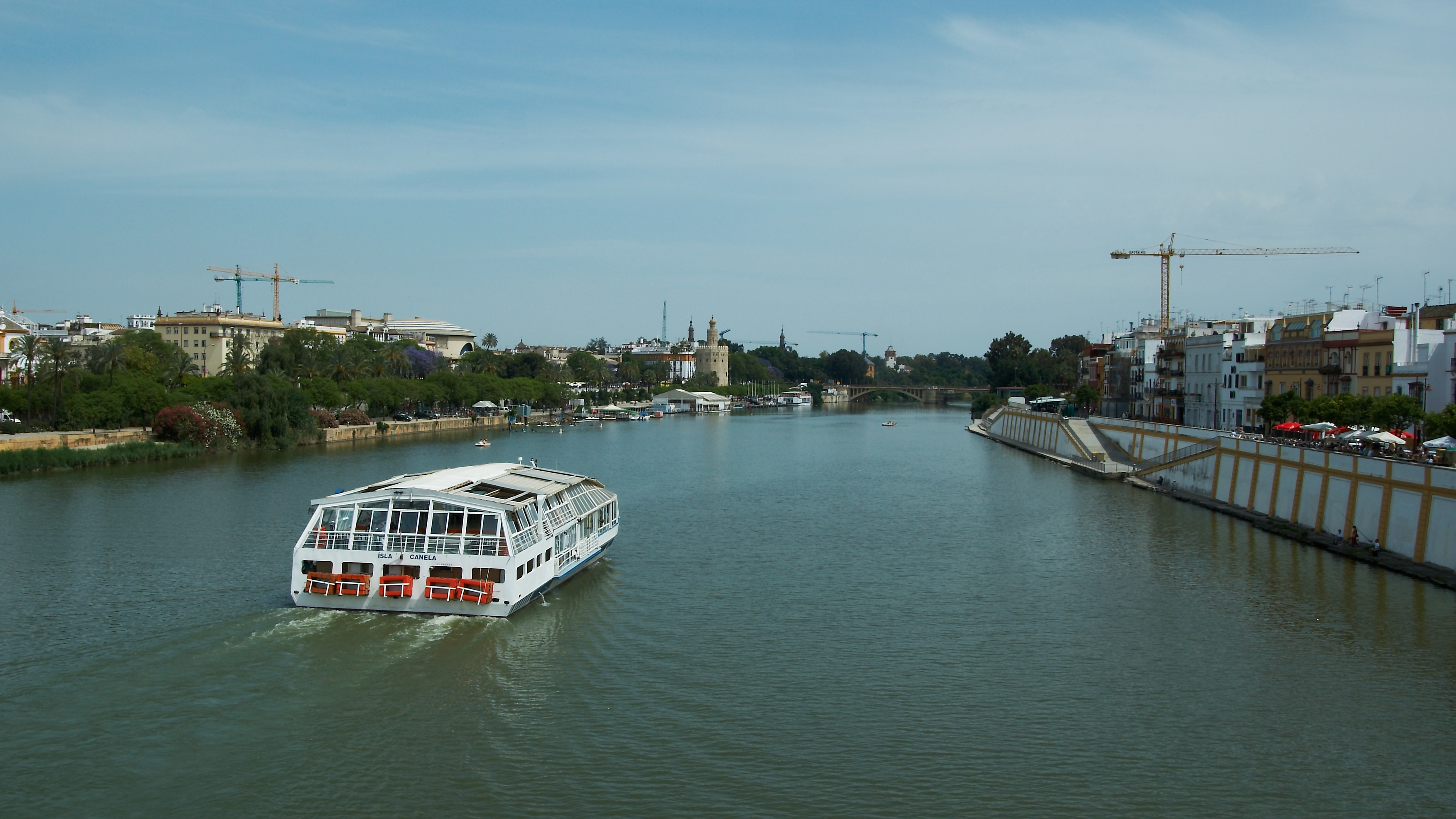 Río Guadalquivir a la altura del Puente de Isabel Segunda, Sevilla, España.